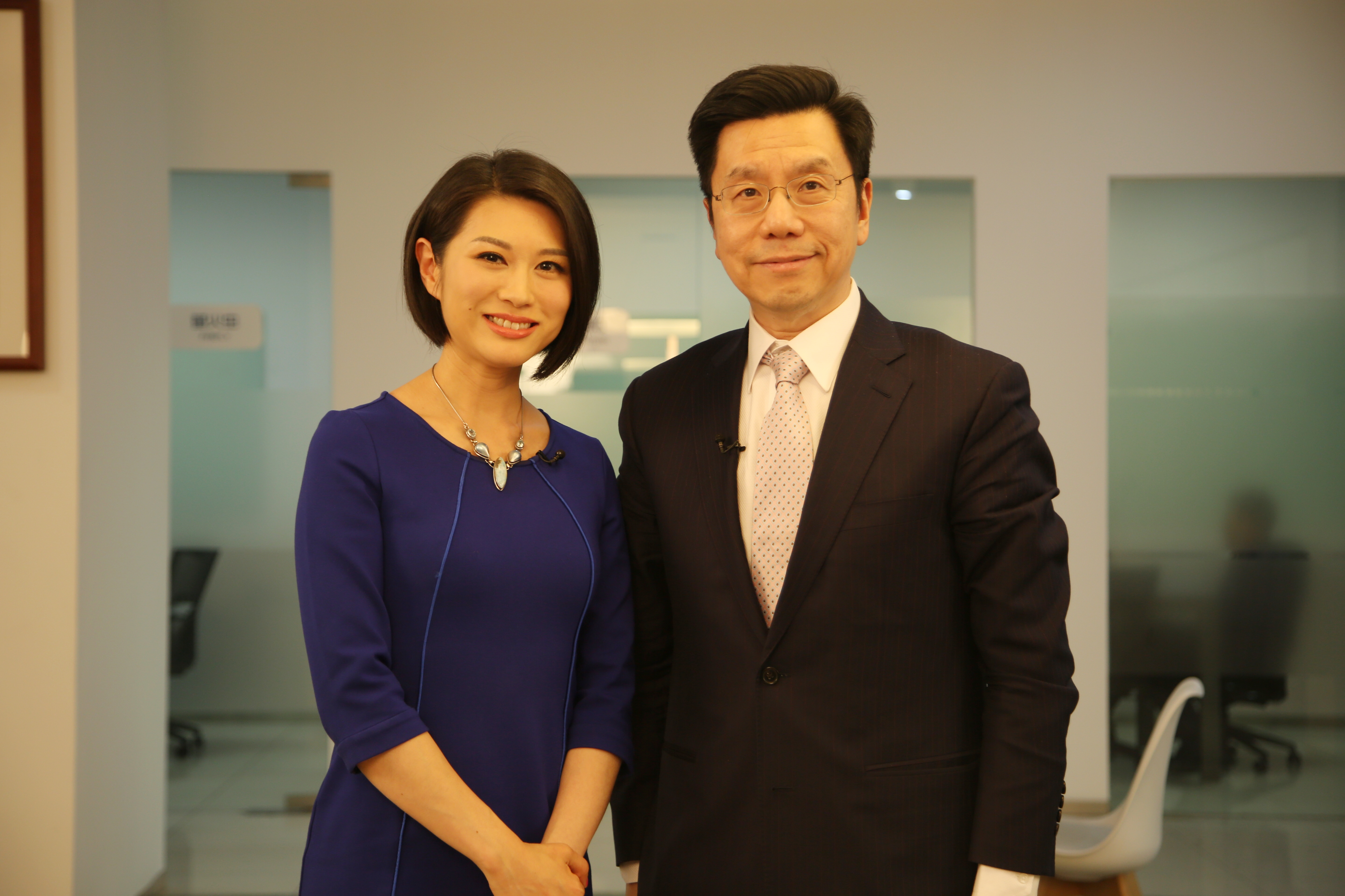 粵語: 《領航者》于盈對話李開復